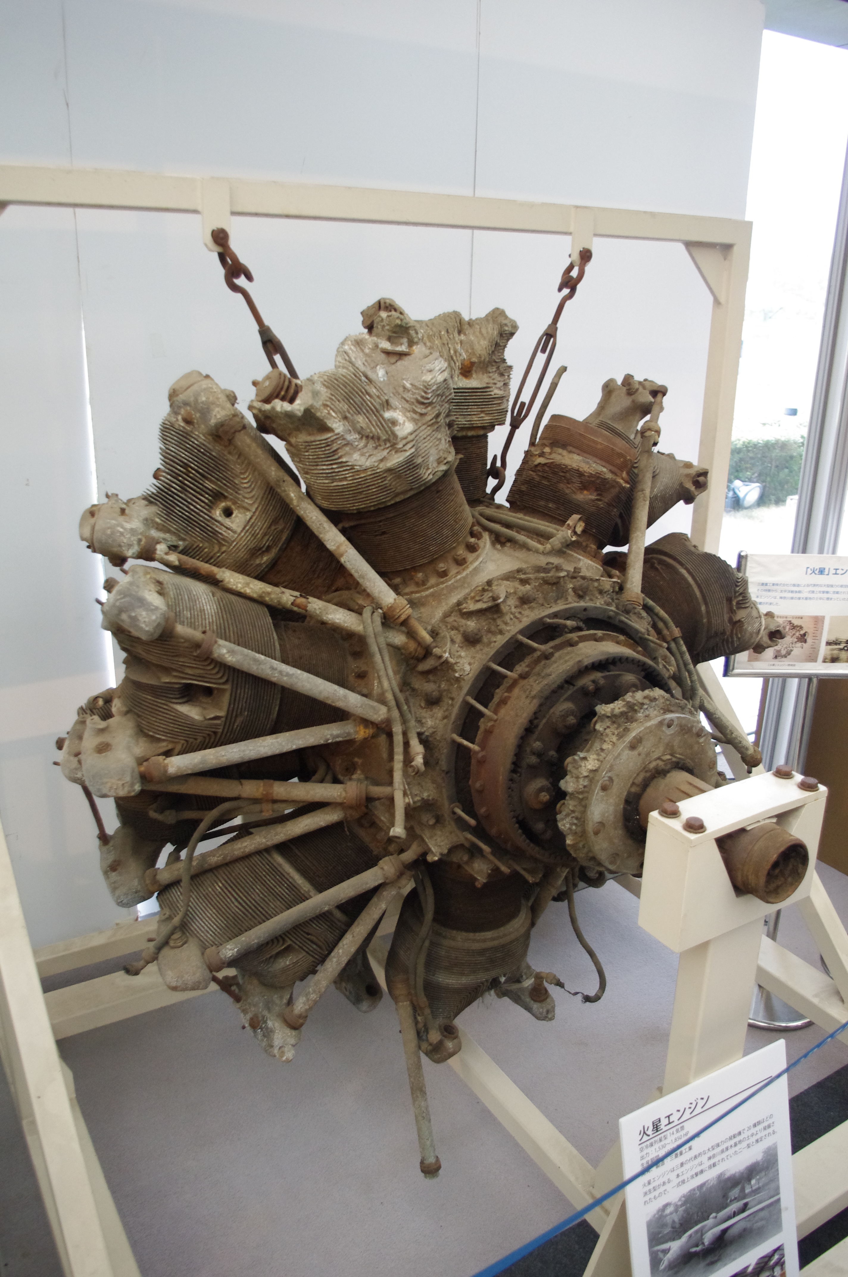 Mitsubishi Kasei Taken at Tokorozawa Aviation Museum.